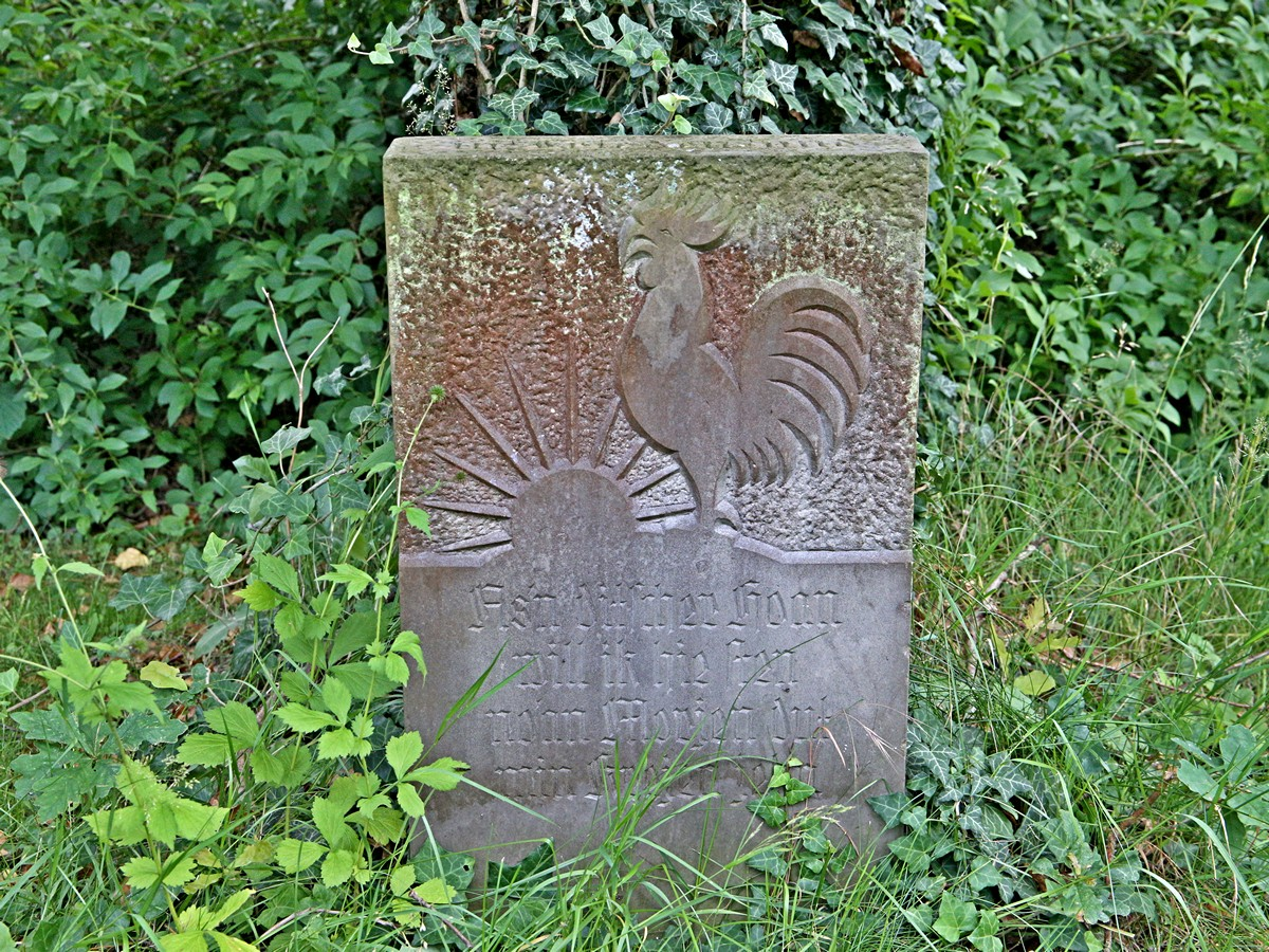 Gedenkstein der Vertriebenen in Bussau. Die niederdeutsche Inschrift lautet: As`n ditscher Hoan will ik hie sten no' an Morjen dut min Krejen jehn. Als deutscher Hahn will ich hier steh'n, nach Morgen (Osten) geht mein Kräh'n.